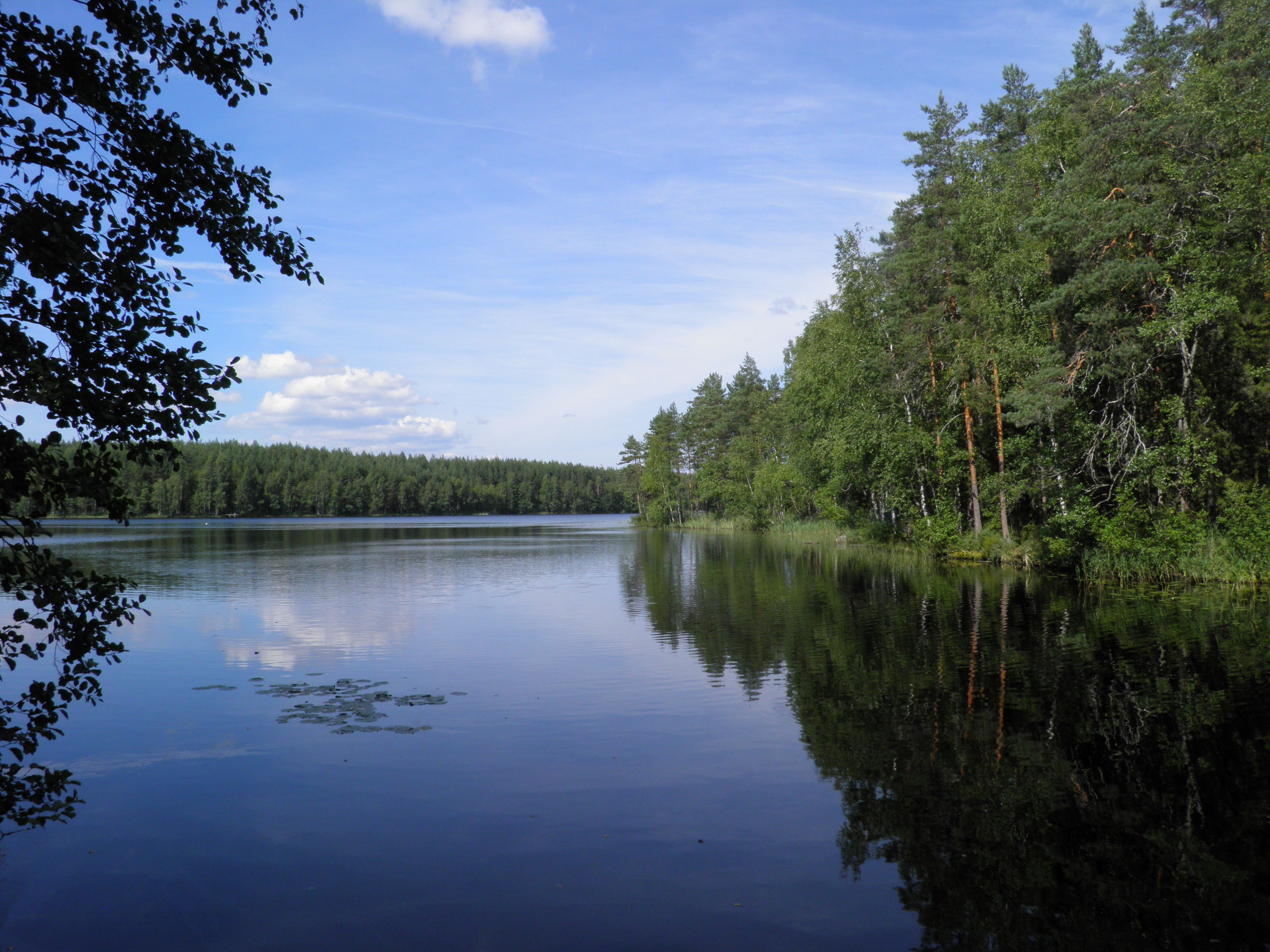 Ylinen Niemisjärvi Hämeenlinnan Evolla etelästä nähtynä.